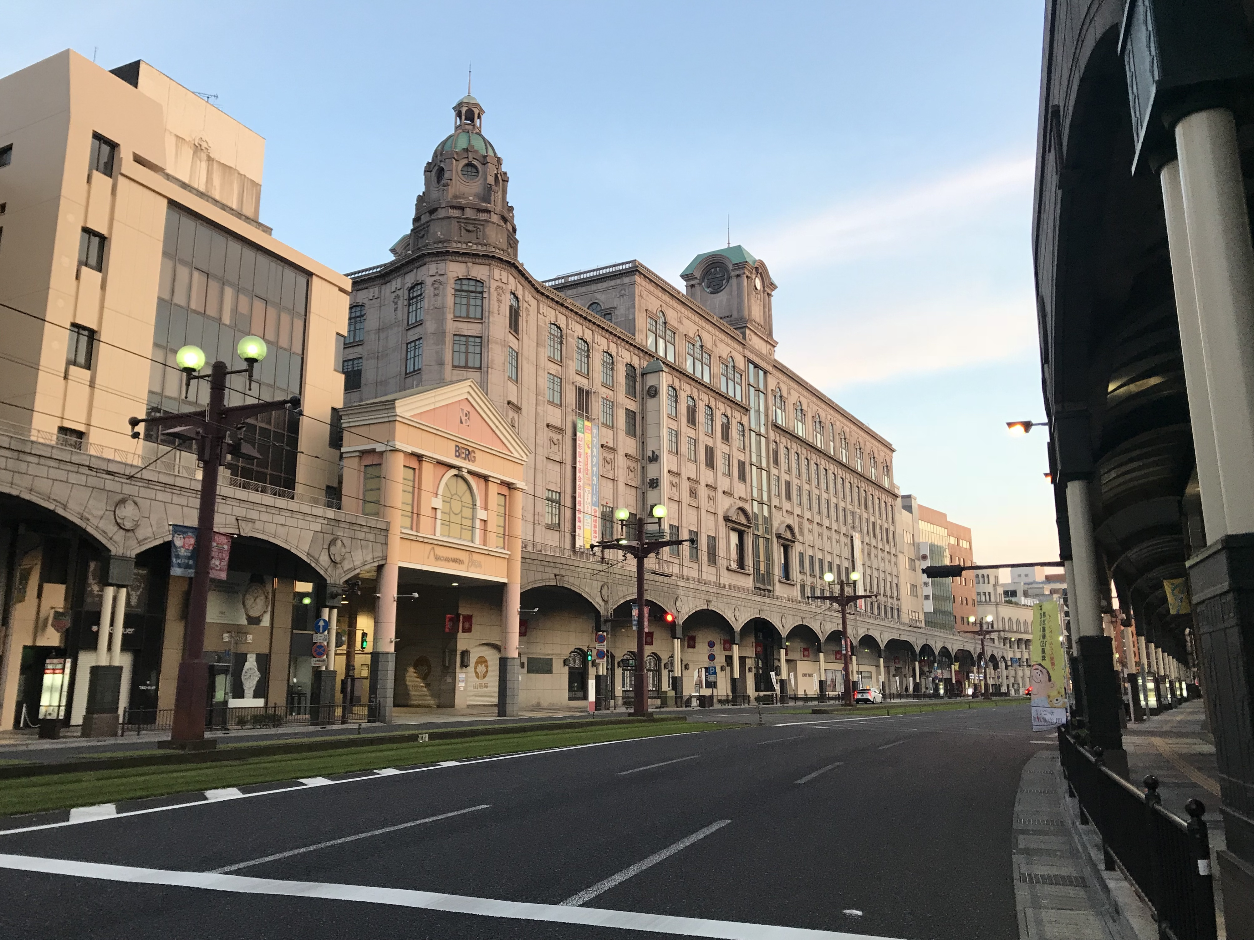 いづろ通電停付近より望む山形屋